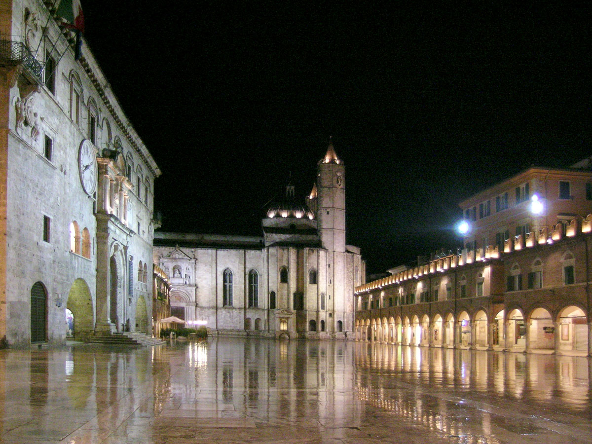 Piazza del Popolo di notte, Ascoli Piceno - Italia.